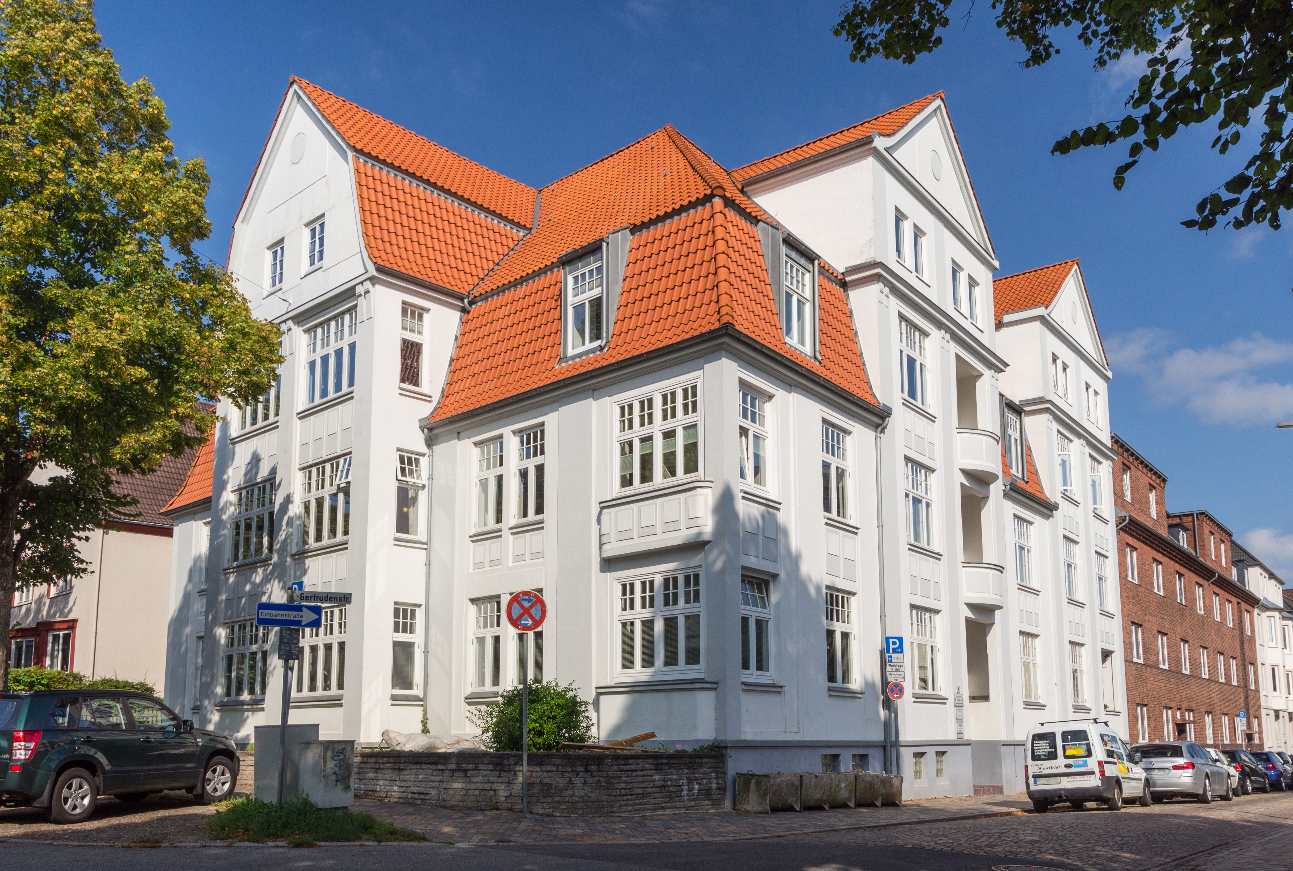 Flensburg-Westliche Höhe, Gertrudenstrasse 1, Mietwohnungshaus, Denkmal-Nr. 6